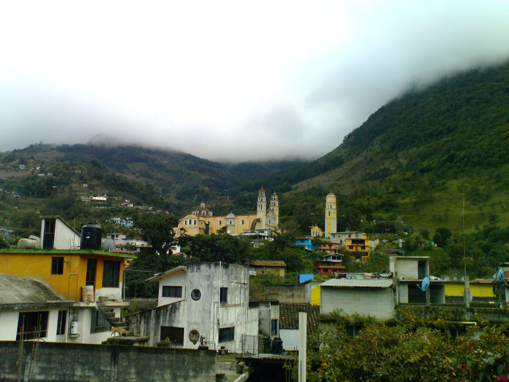 Tepango